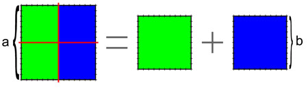 Une démonstration grec archaïque montrant que le double d'un carré parfait n'est jamais un carré parfait. Illustration de la théorie de O. Becker sur cette question